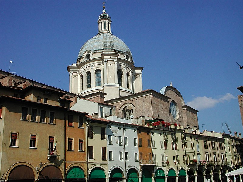 Cupola della Chiesa di Sant'Andrea a Mantova Source: photo uploaded by User:RicciSpeziari. Photographer: Riccardo Speziari